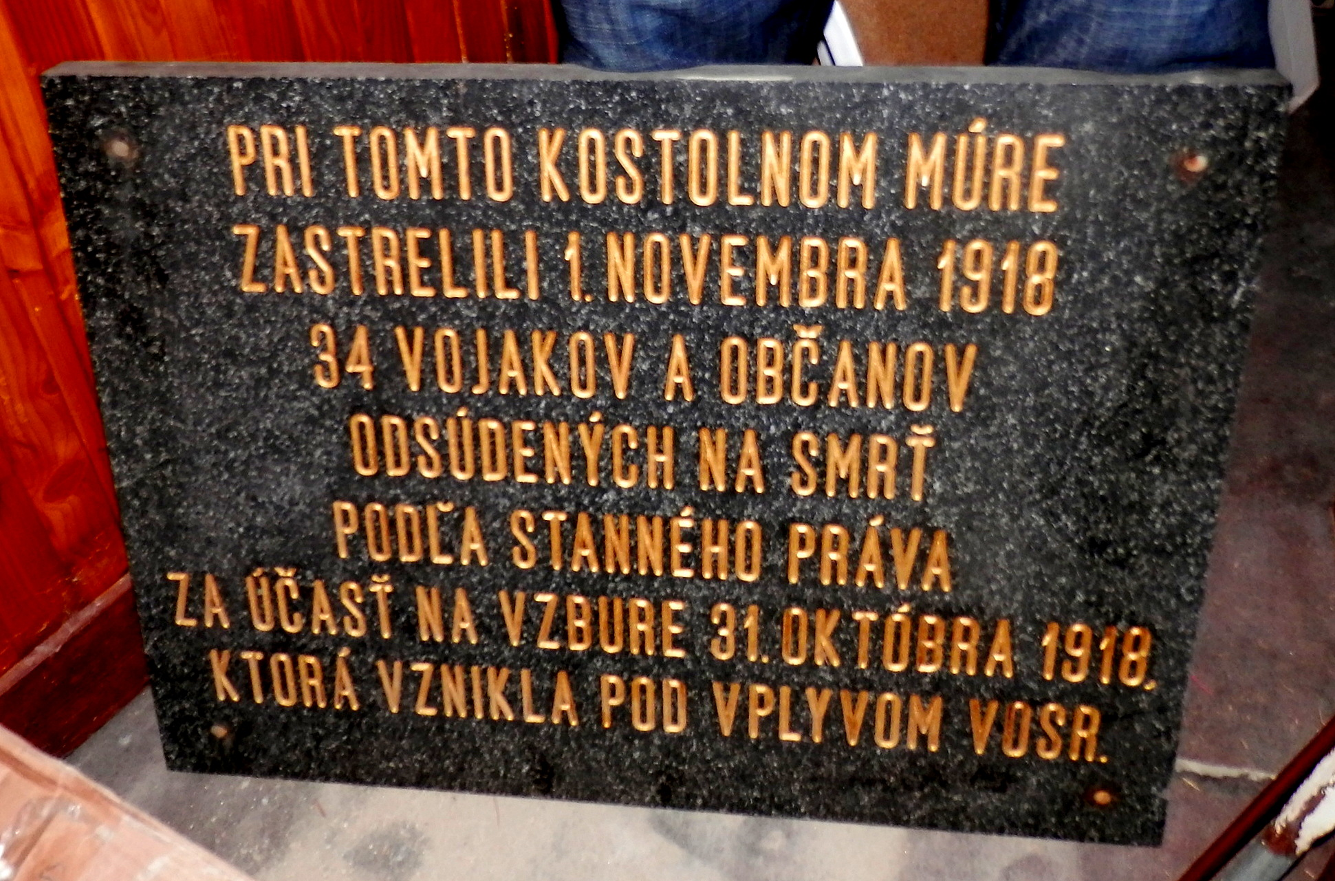 Depozit farského kostola v Prešove. Pamätná tabuľa bola pôvodne umiestnená na severnom múre konkatedrály svätého Mikuláša. Sňatá bola pri oprave kostola r. 1990. Text na tabuli znie: "Pri tomto kostolnom múre zastrelili 1.novembra 1918 34 vojakov a občanov odsúdených na smrť podľa stanného práva za účasť na vzbure 31.októbra 1918, ktorá vznikla pod vplyvom VOSR."